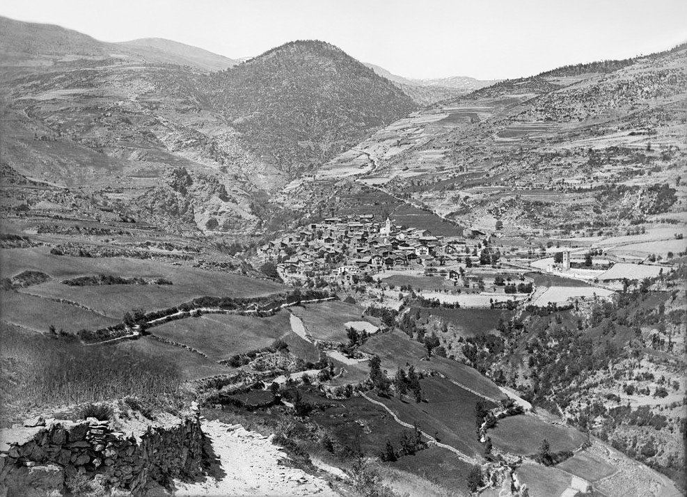 Imatge